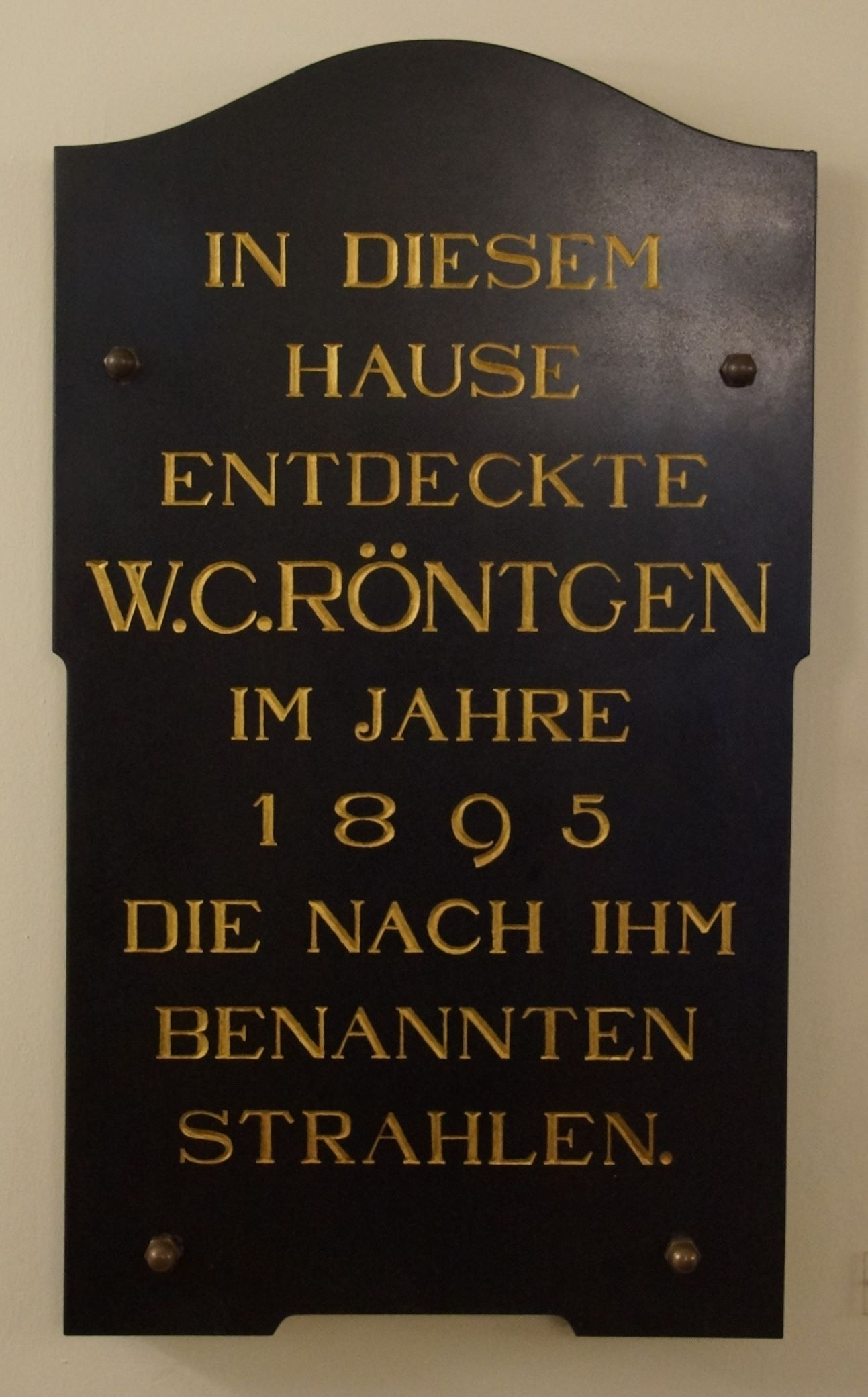 Aufgenommen während des zweiten Stammtischs von WP:Unterfranken in Würzburg